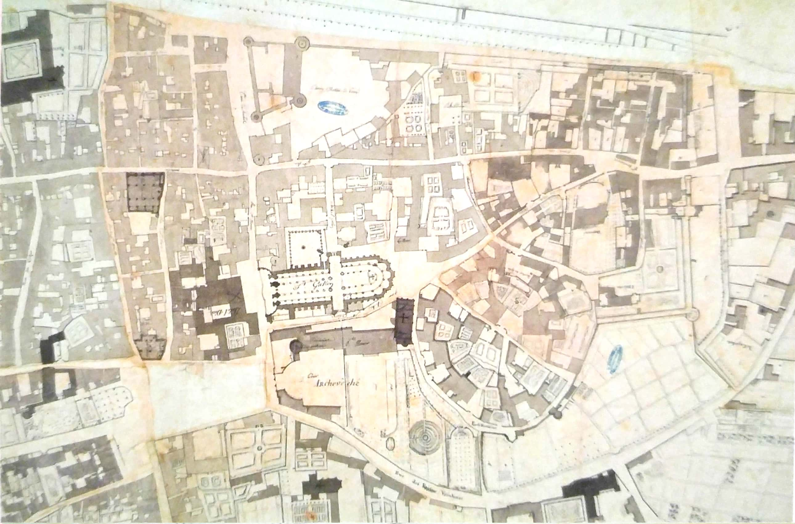 vieux tours,Plan fayot, 1783,extrait, quartier canoniale du cloitre Saint-Gatien